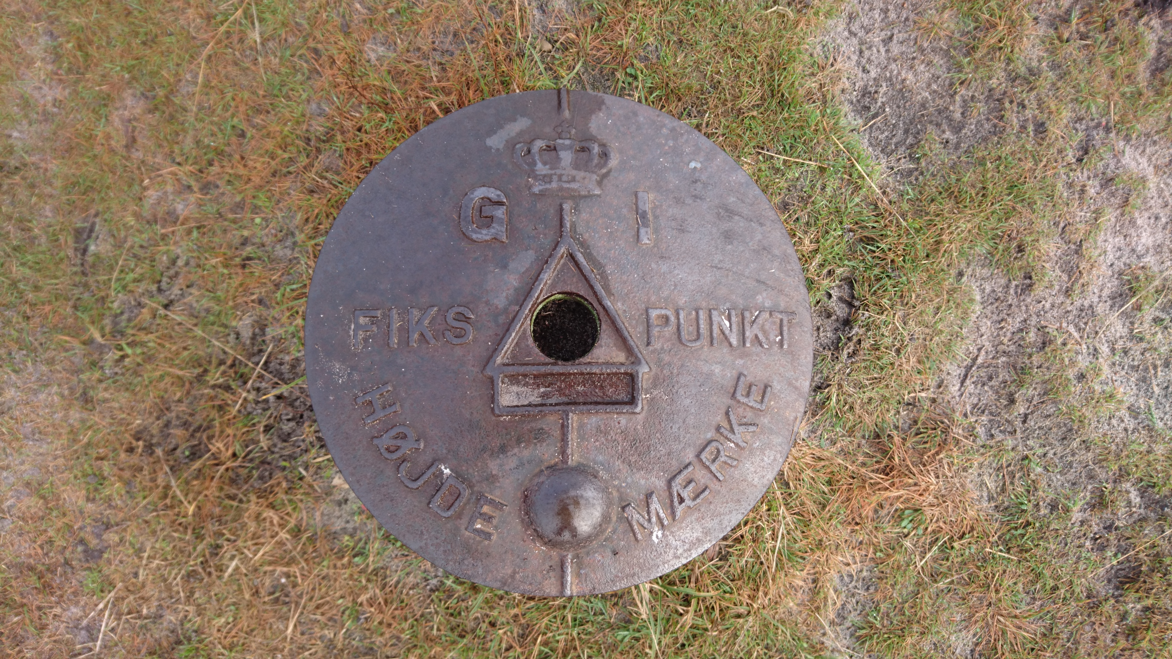 Fikspunkt på toppen af Stoltenbjerg i Randbøl Hede